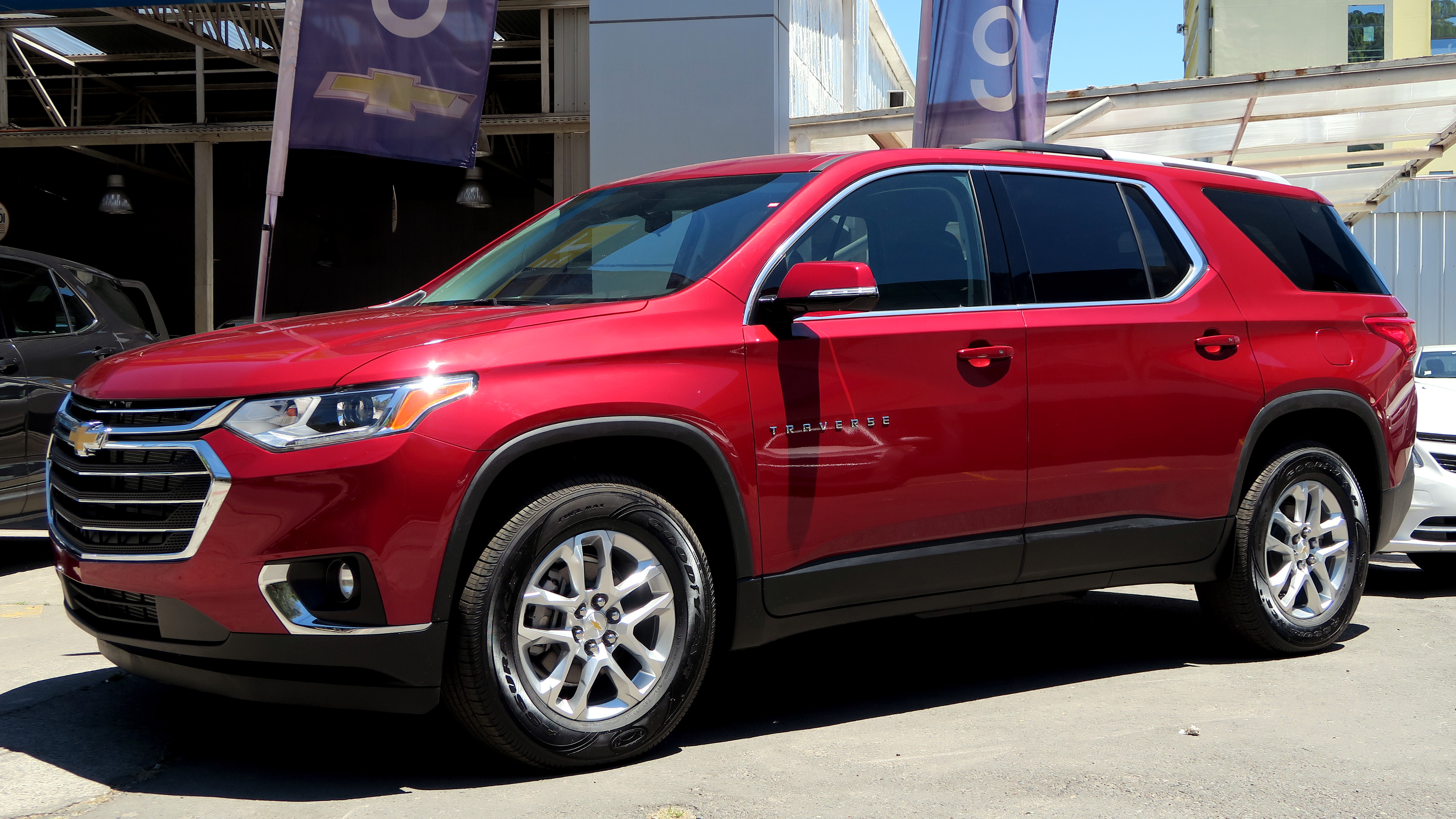 Chevrolet Traverse 3.6 LT 2018